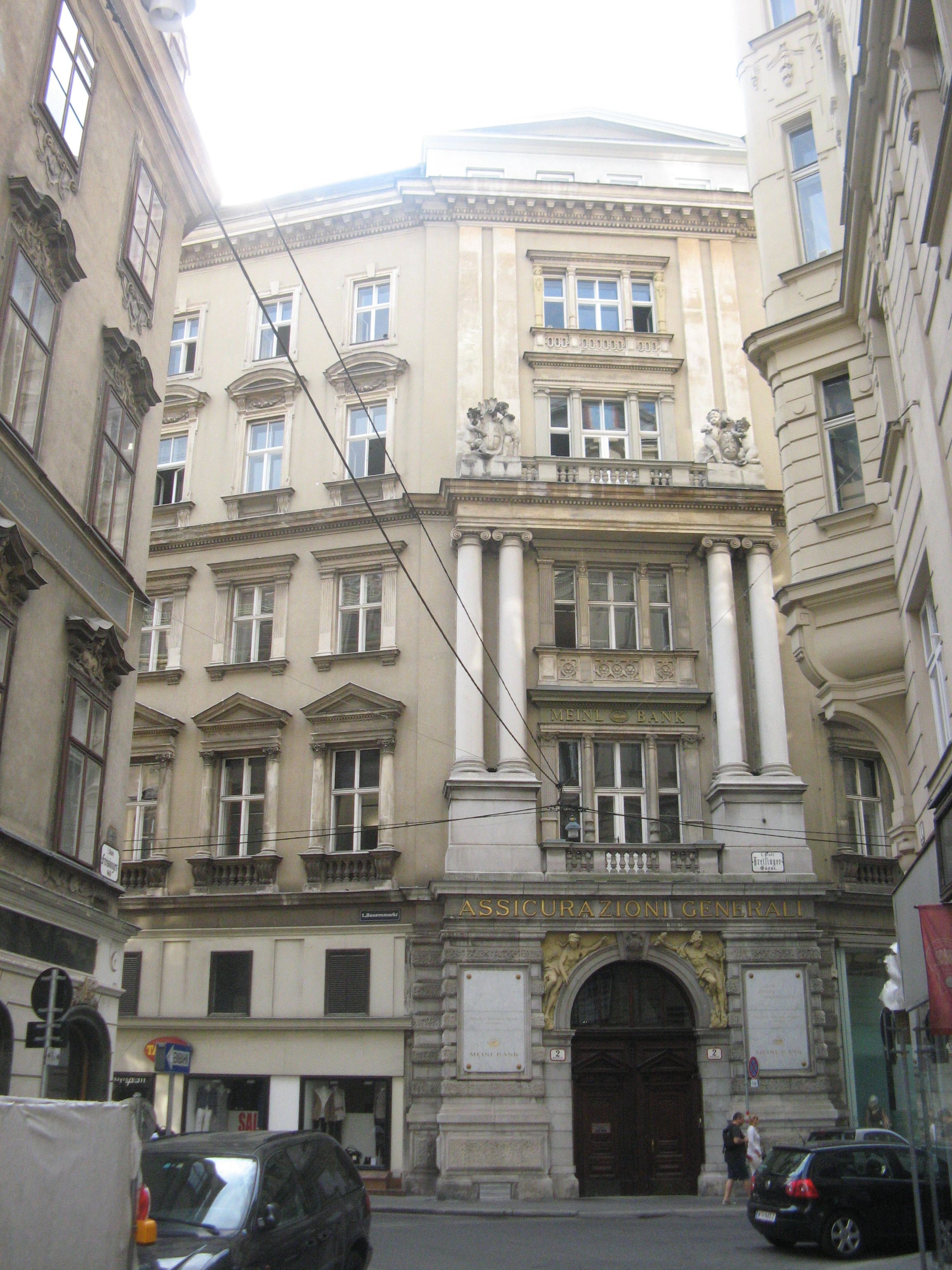 Assicurazioni Generali (1880) von Otto Thíenemann, Bauernmarkt 2, Wien-Innere Stadt